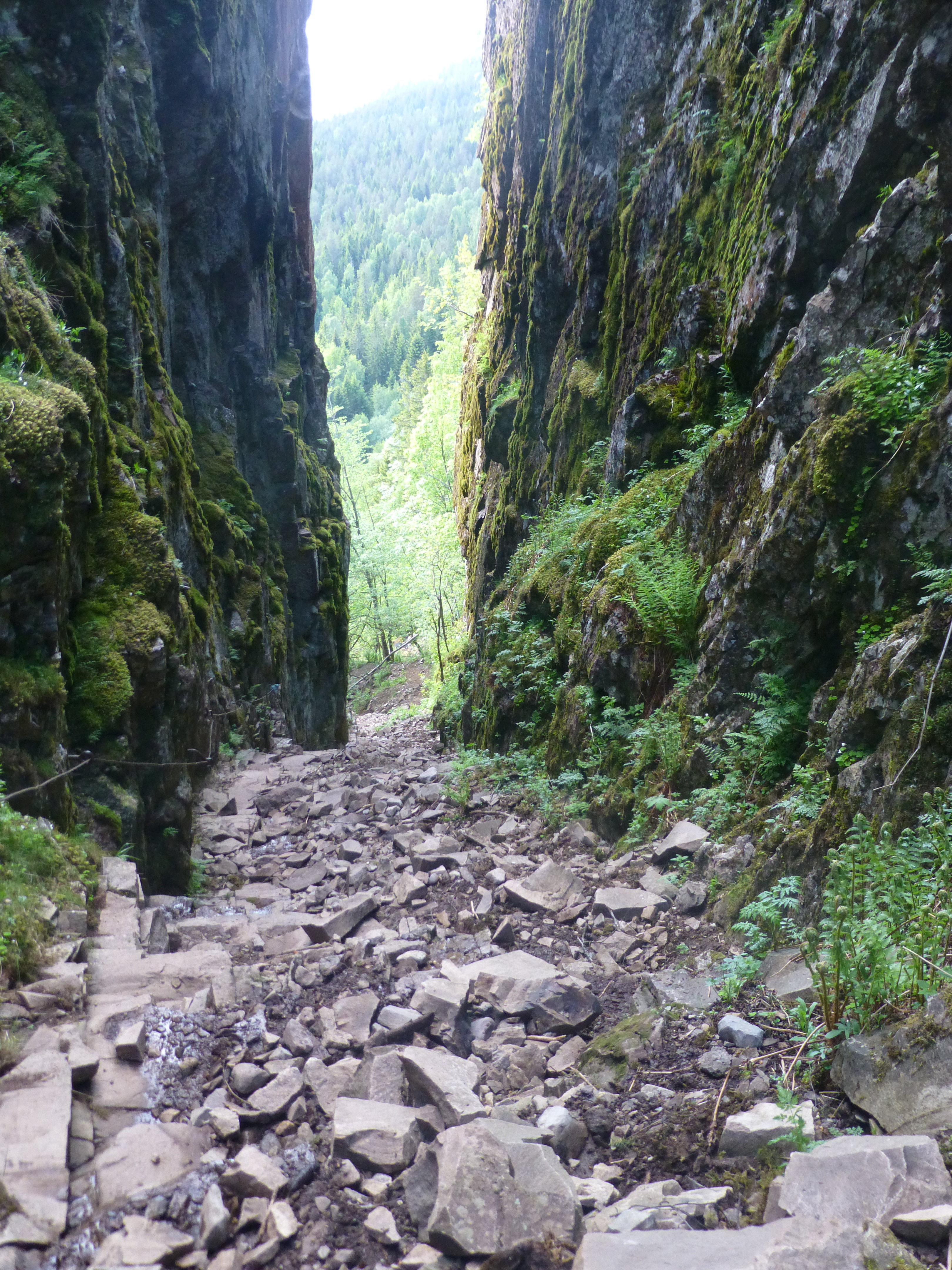 Mørkgonga i Krokskogen i Åsa.